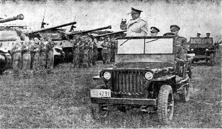 Josip Broz Tito ob dnevu JLA pregleduje oklopno enoto.